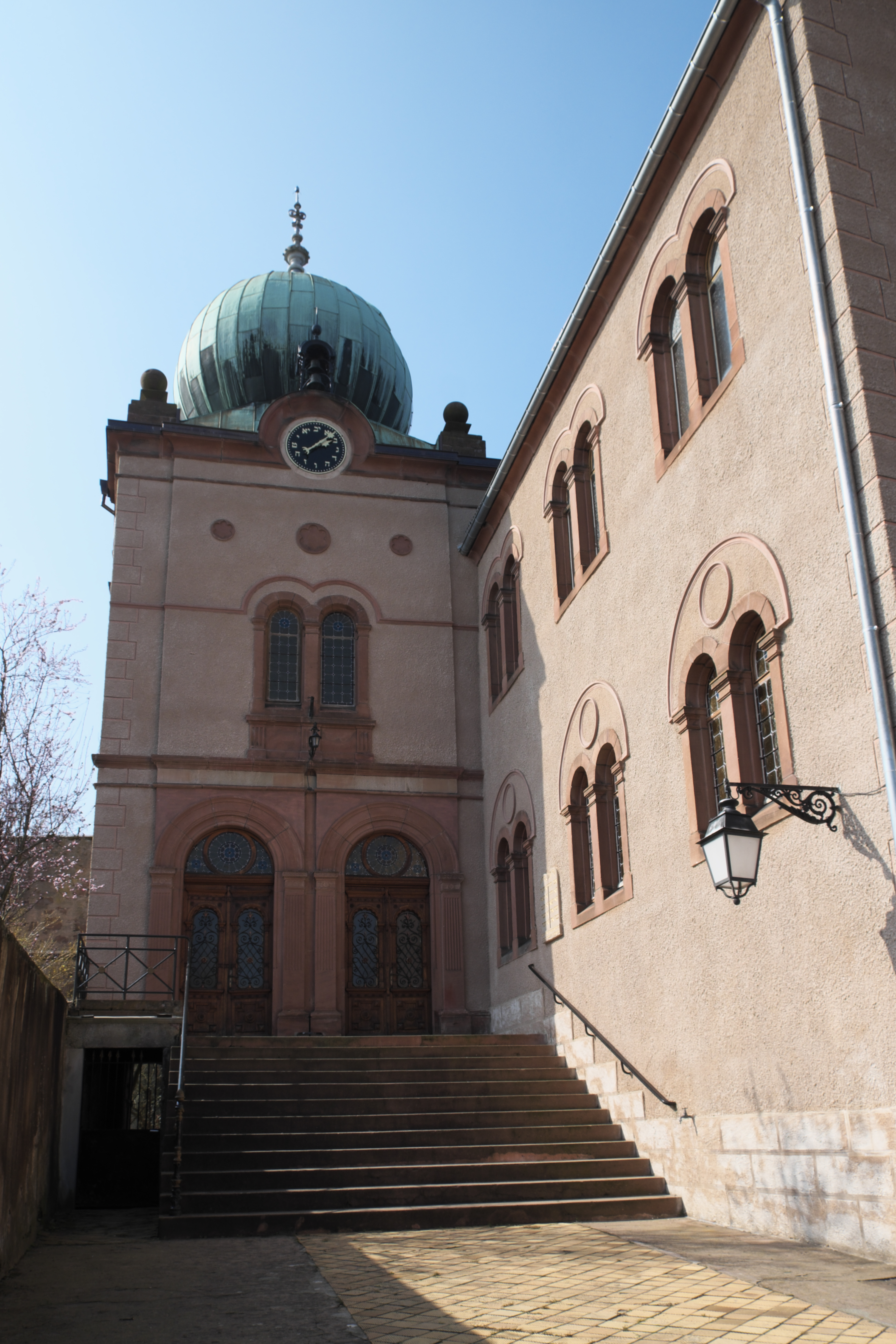 Synagoge in Ingwiller im Département Bas-Rhin (Region Alsace-Champagne-Ardenne-Lorraine/Frankreich)